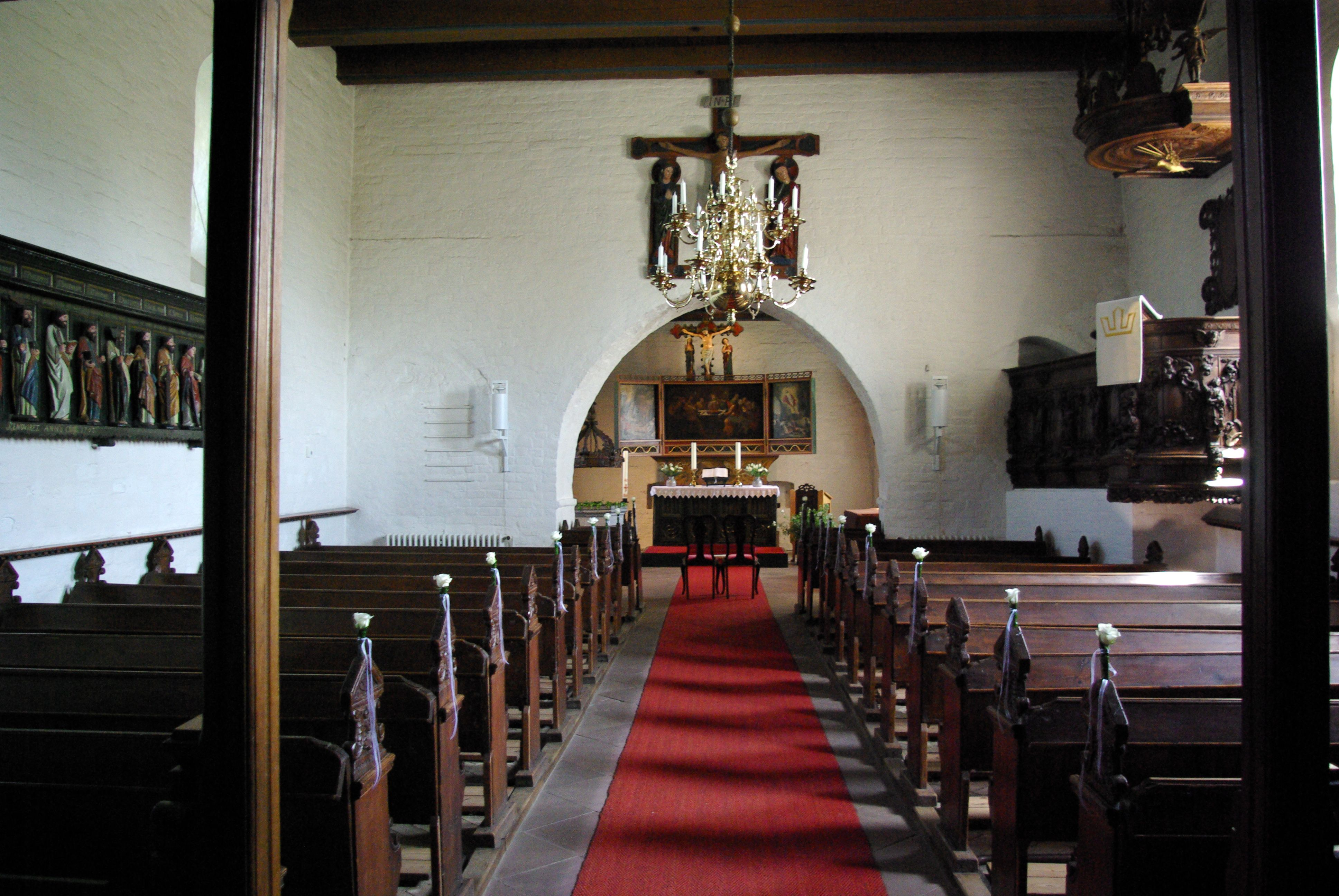 Husum, Stadtteil Schobüll, die Kirche "Kirchlein am Meer", die Innenansicht mit Blick zum Altar (Geotag in den Exif-Daten).